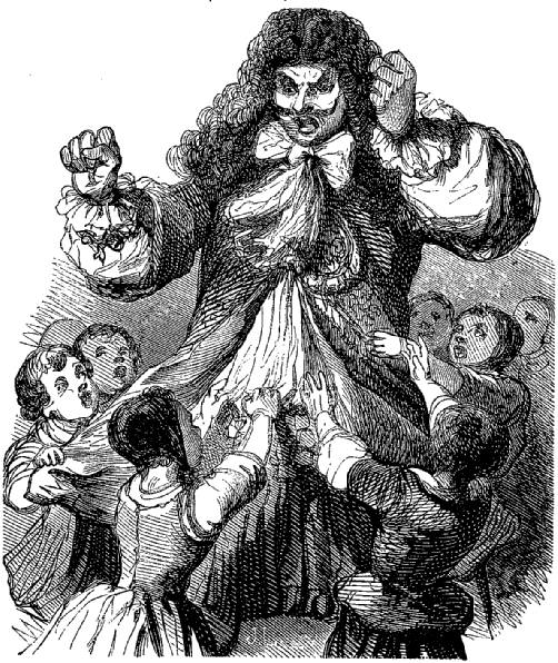 Représentation de Monsieur de Pourceaugnac dans la pièce du même nom écrite par Molière, acte 2, scène 10.